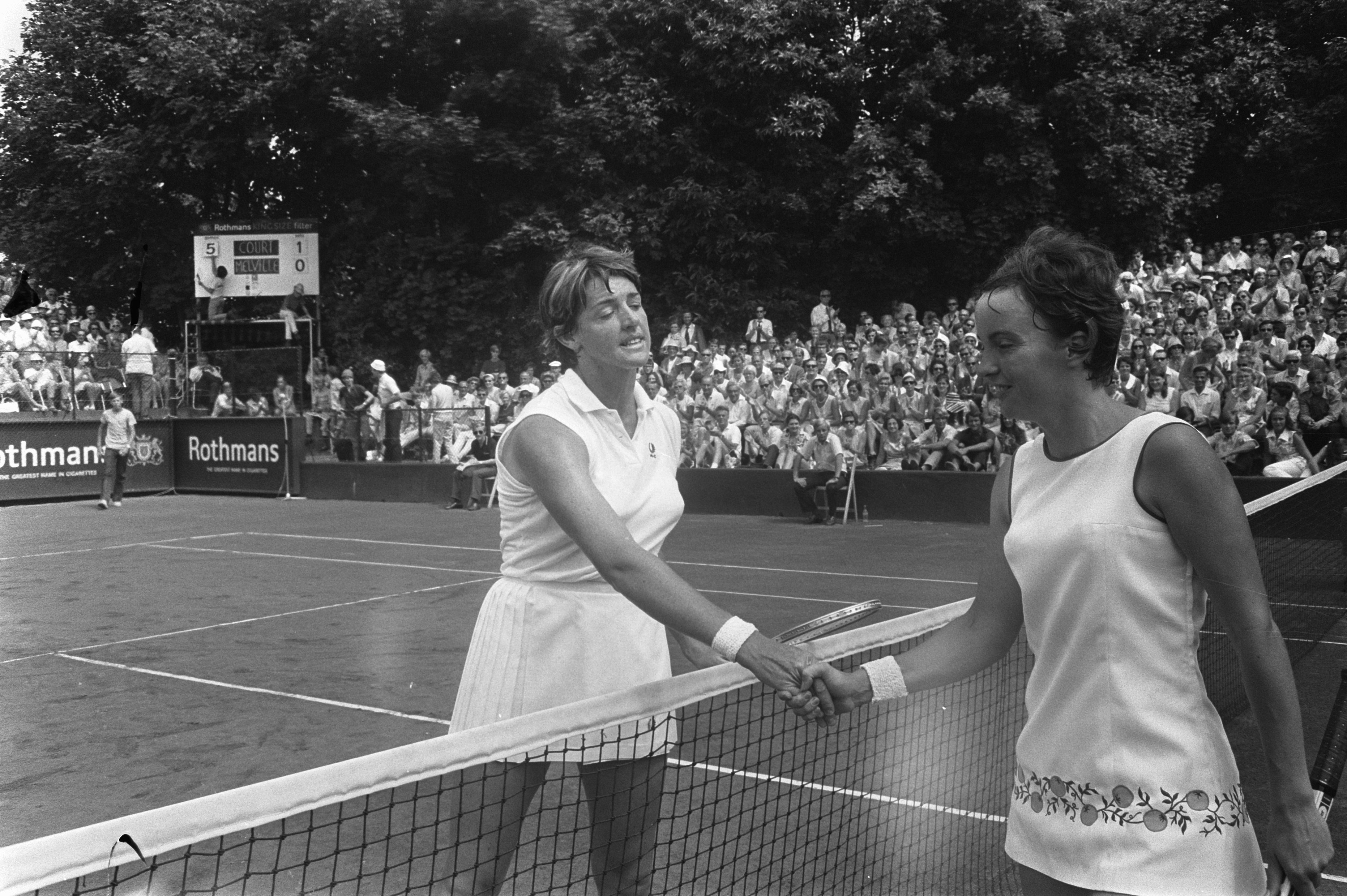 Collectie / Archief : Fotocollectie Anefo Reportage / Serie : [ onbekend ] Beschrijving : Internationaal tennistoernooi in Hilversum ( t Melkhuisje Kerry Melville (rechts) feliciteert Margaret Court Datum : 2 augustus 1970 Locatie : Hilversum Trefwoorden : tennis Persoonsnaam : Court, Margaret Fotograaf : Koch, Eric / Anefo Auteursrechthebbende : Nationaal Archief Materiaalsoort : Negatief (zwart/wit) Nummer archiefinventaris : bekijk toegang 2.24.01.05 Bestanddeelnummer : 923-7227